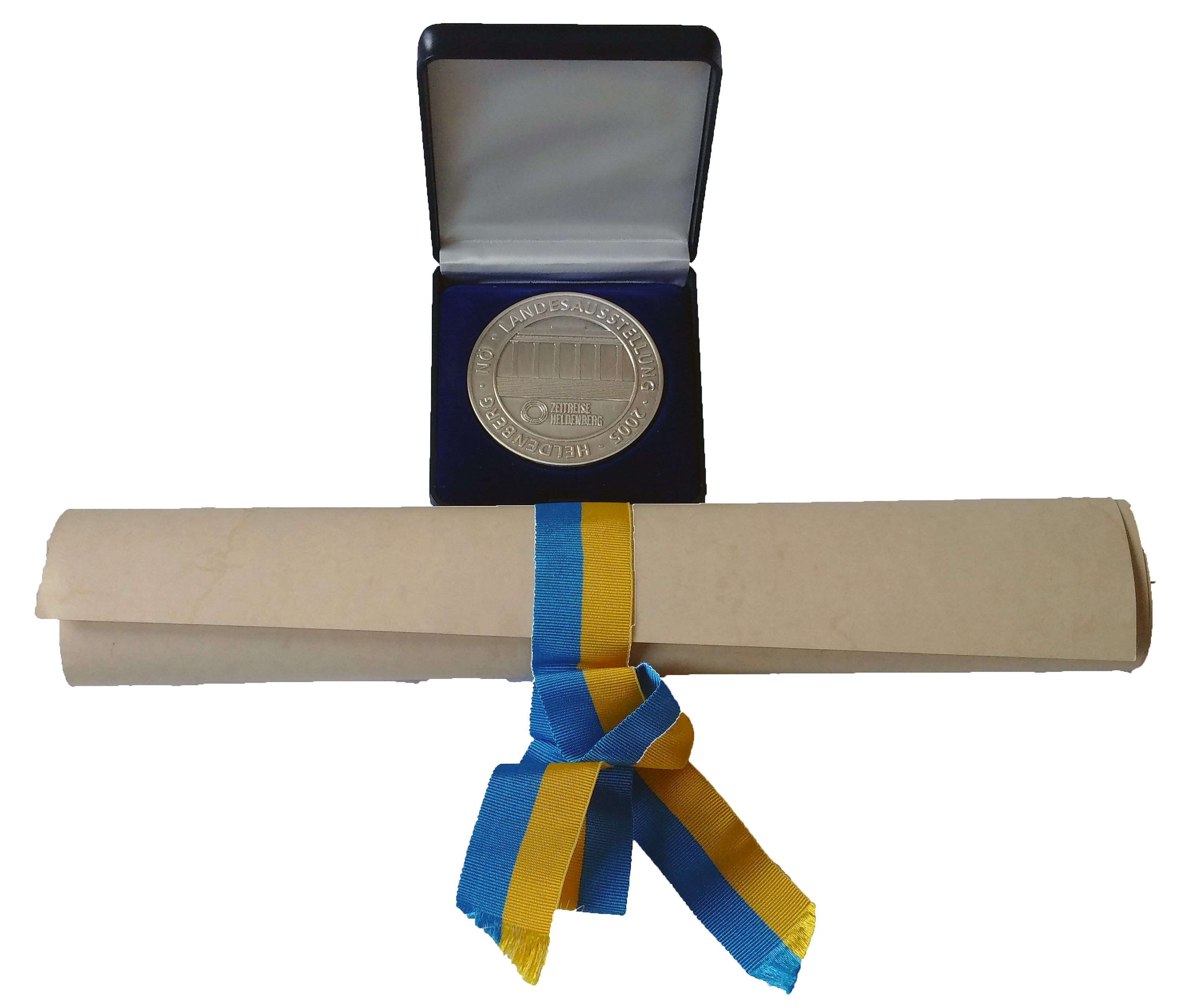 Anerkennungsmedaille des Landes Niederösterreich für Verdienste um die Landesausstellung (Version 2005) mit Urkunde